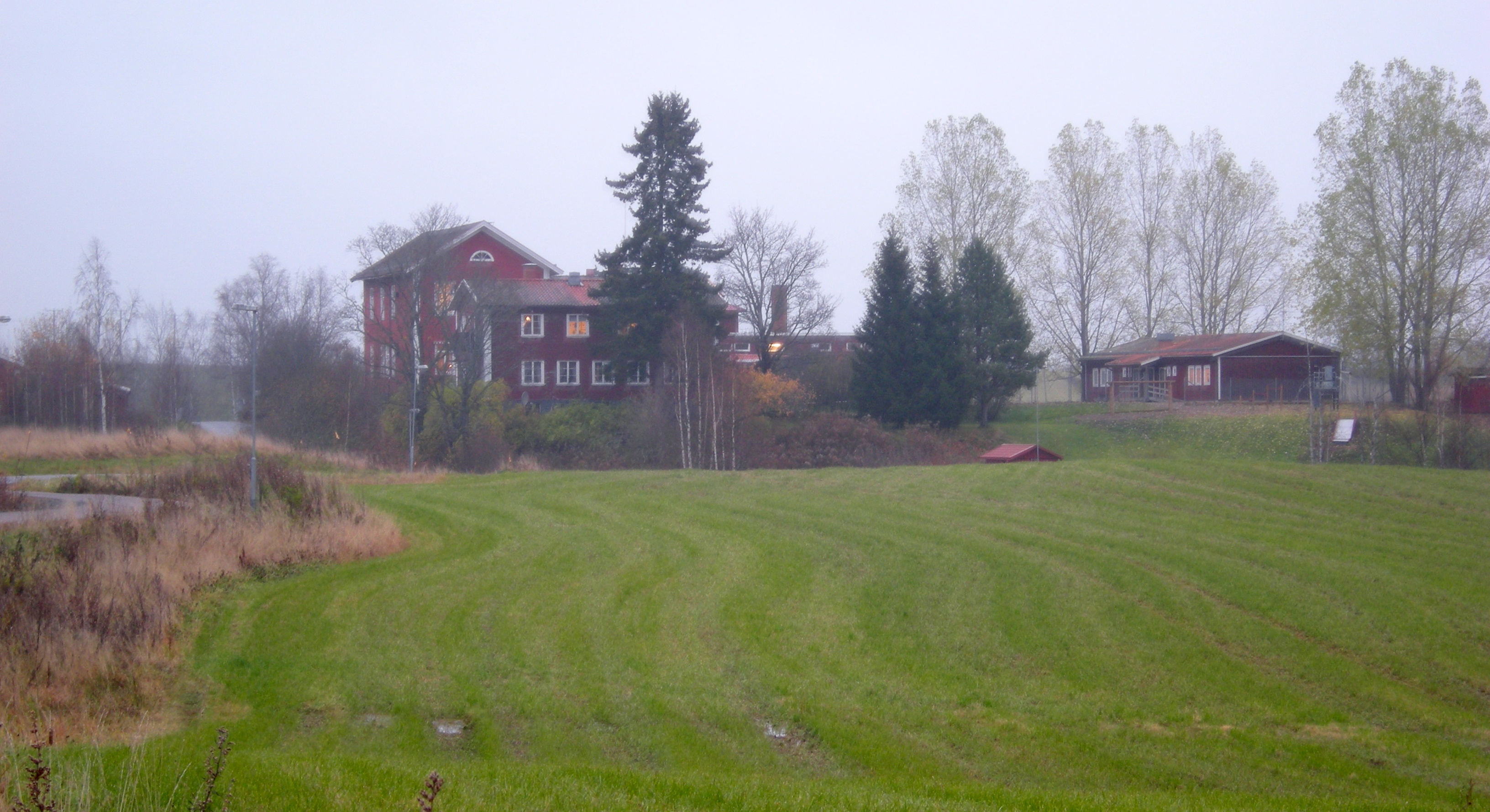 Halvarsgårdars skola i Borlänge kommun, Dalarna.